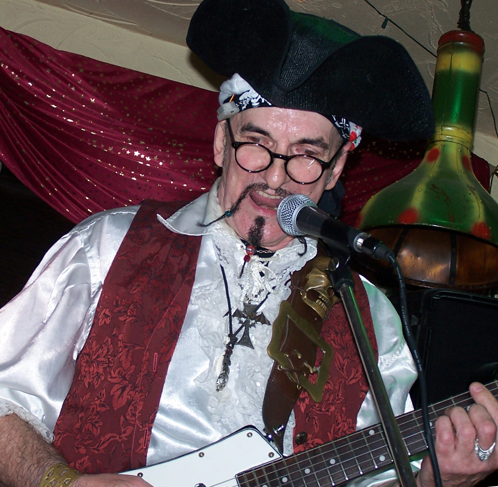 Jon Symon, Auftritt im Bayern-Stad’l in Hannover am 18. Dezember 2008 thumb|Original Uploaded with Reworkhelper